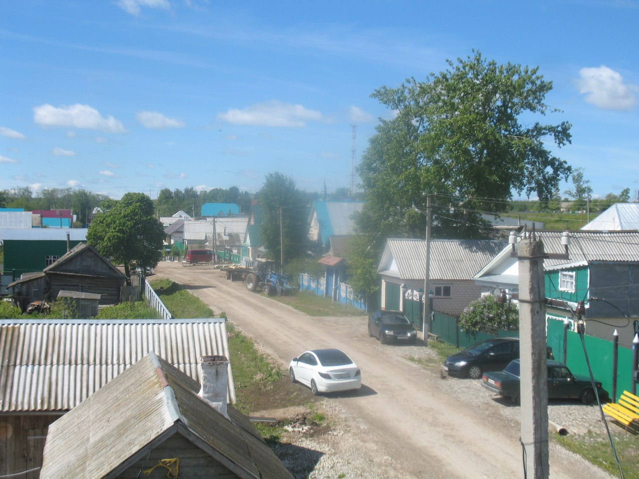 Татарча/tatarça: Баландыш авылының бер урамы. Җәй.